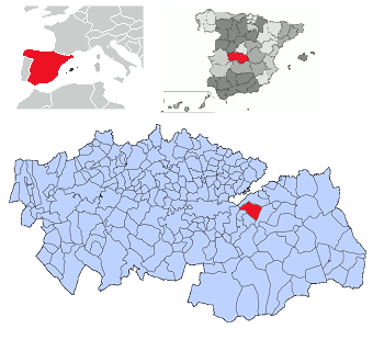 Villasequilla en la provincia de Toledo